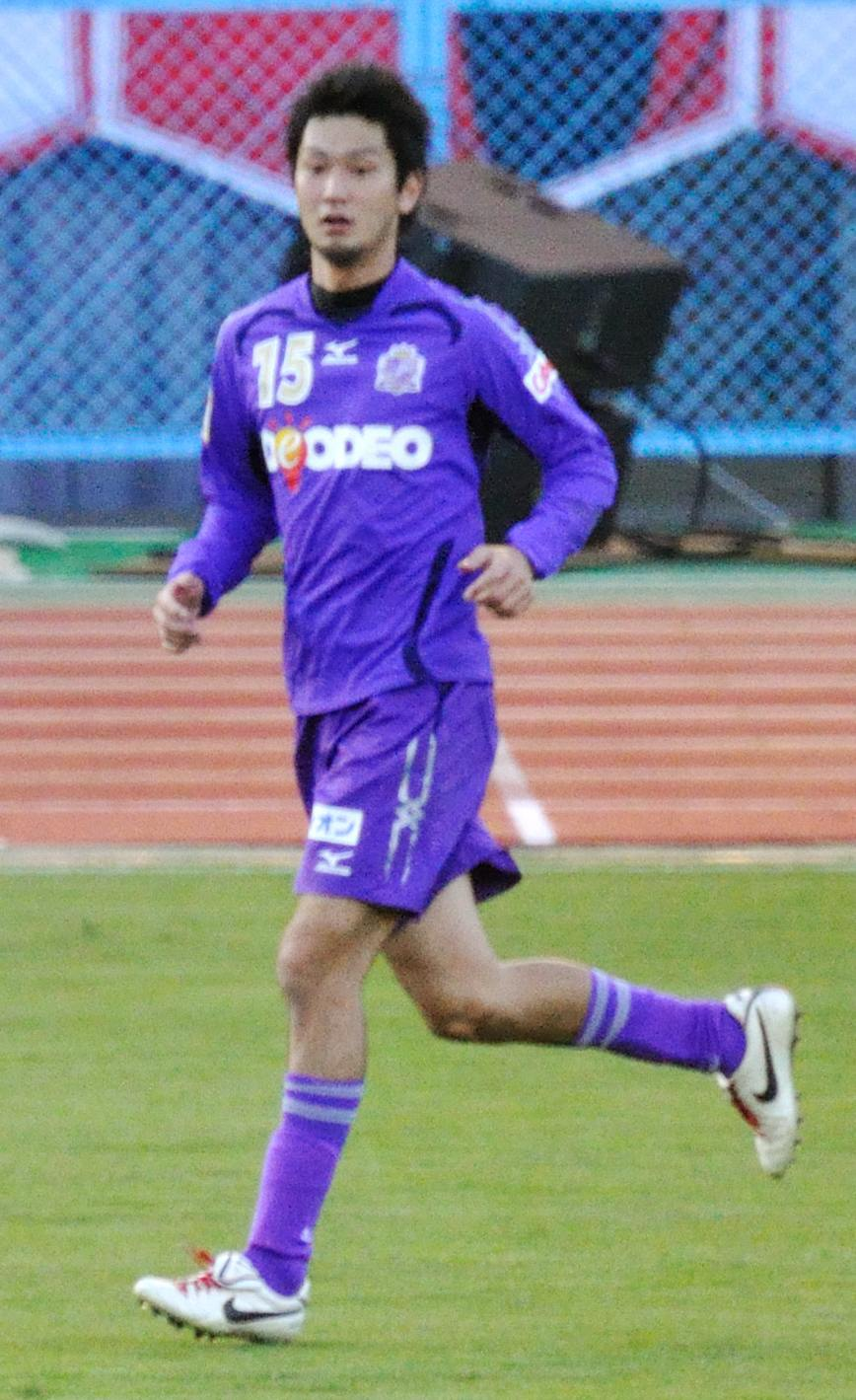 Yōjiro Takahagi DSC_7721